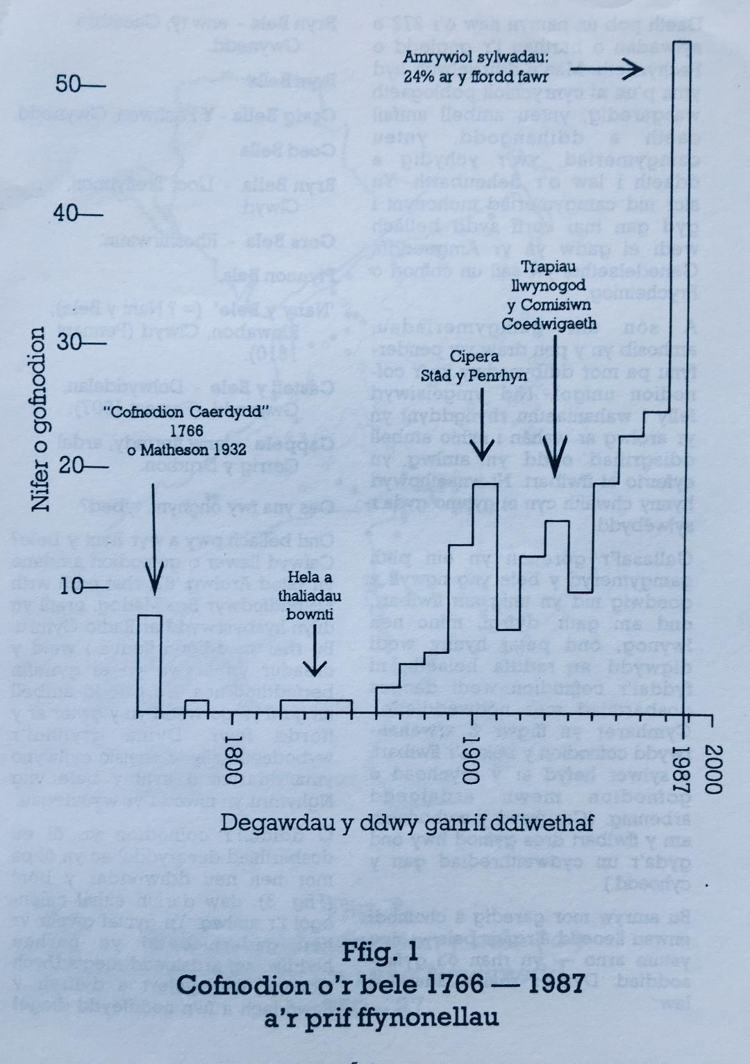 Graff yn dangos sut mae'r o gofnodion y bele goed wedi amrywio dros y ddwy ganrif ddiwethaf o lyfryn a gyhoeddwyd yn 1988